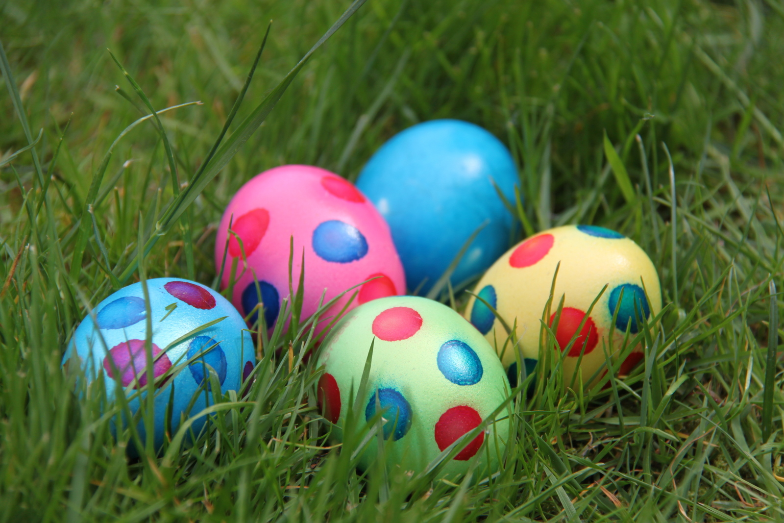 Easter eggs